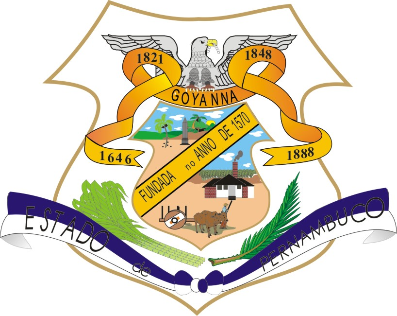 Bandeira de Goiana - PE